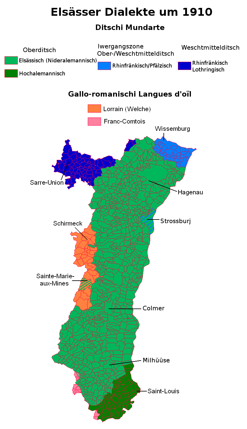 Carte des dialectes alsaciens vers 1910